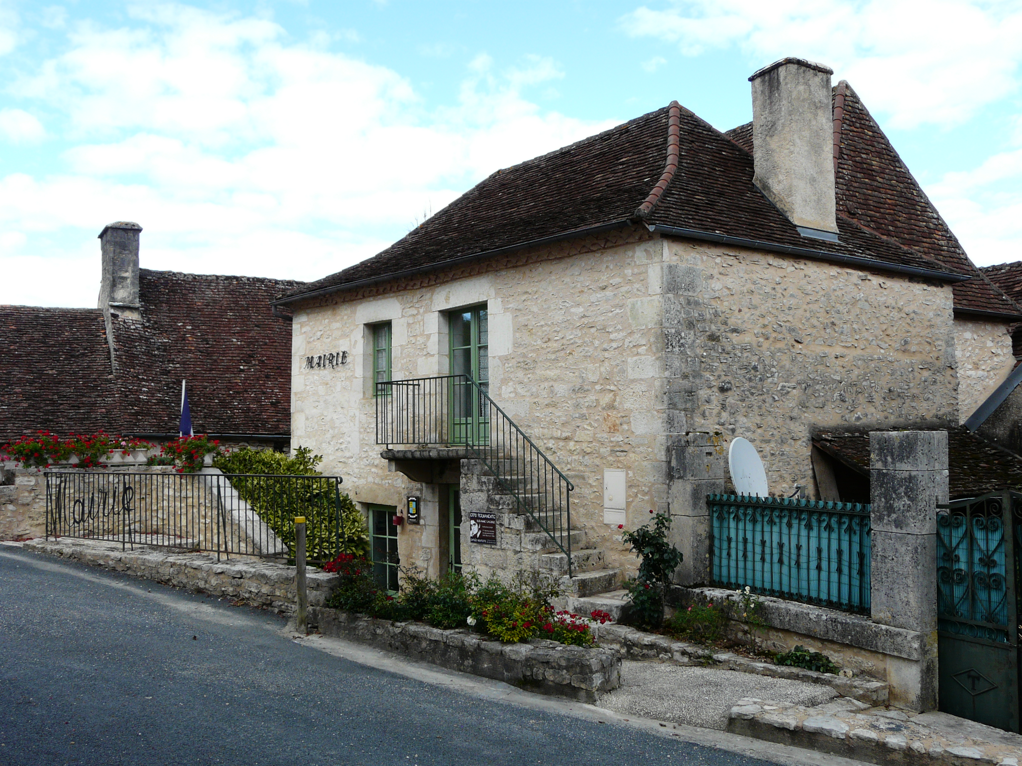 La mairie d'Ajat, Dordogne, France.